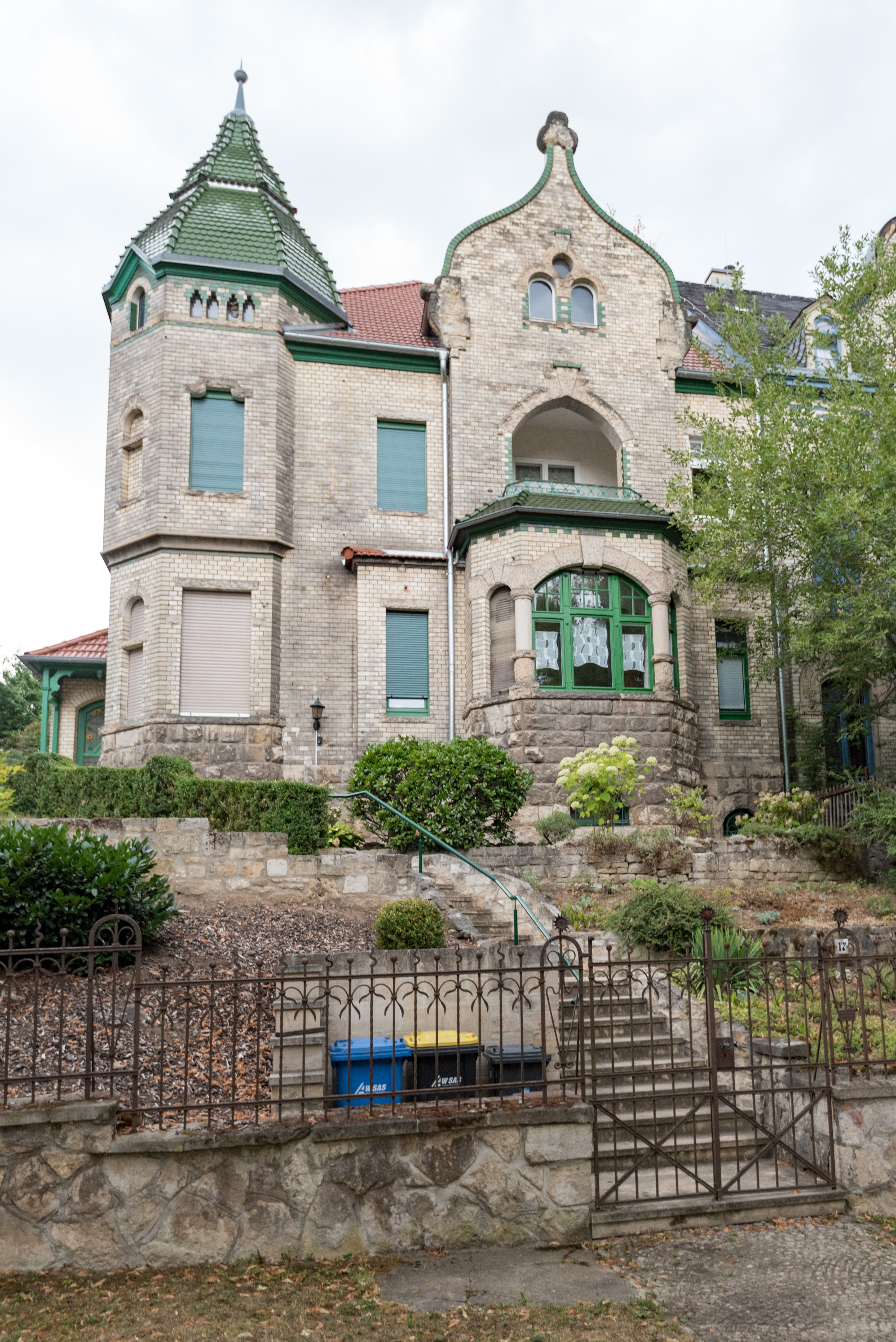 Naumburg (Saale), Luisenstraße 17